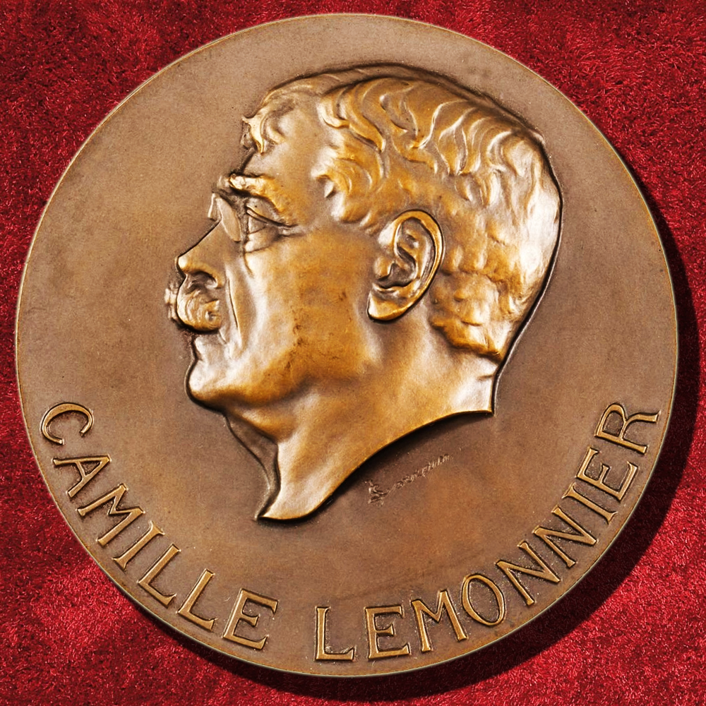 Médaille à l'effigie de Camille Lemonnier réalisée par Jenny Lorrain (1867-1943) en 1942.